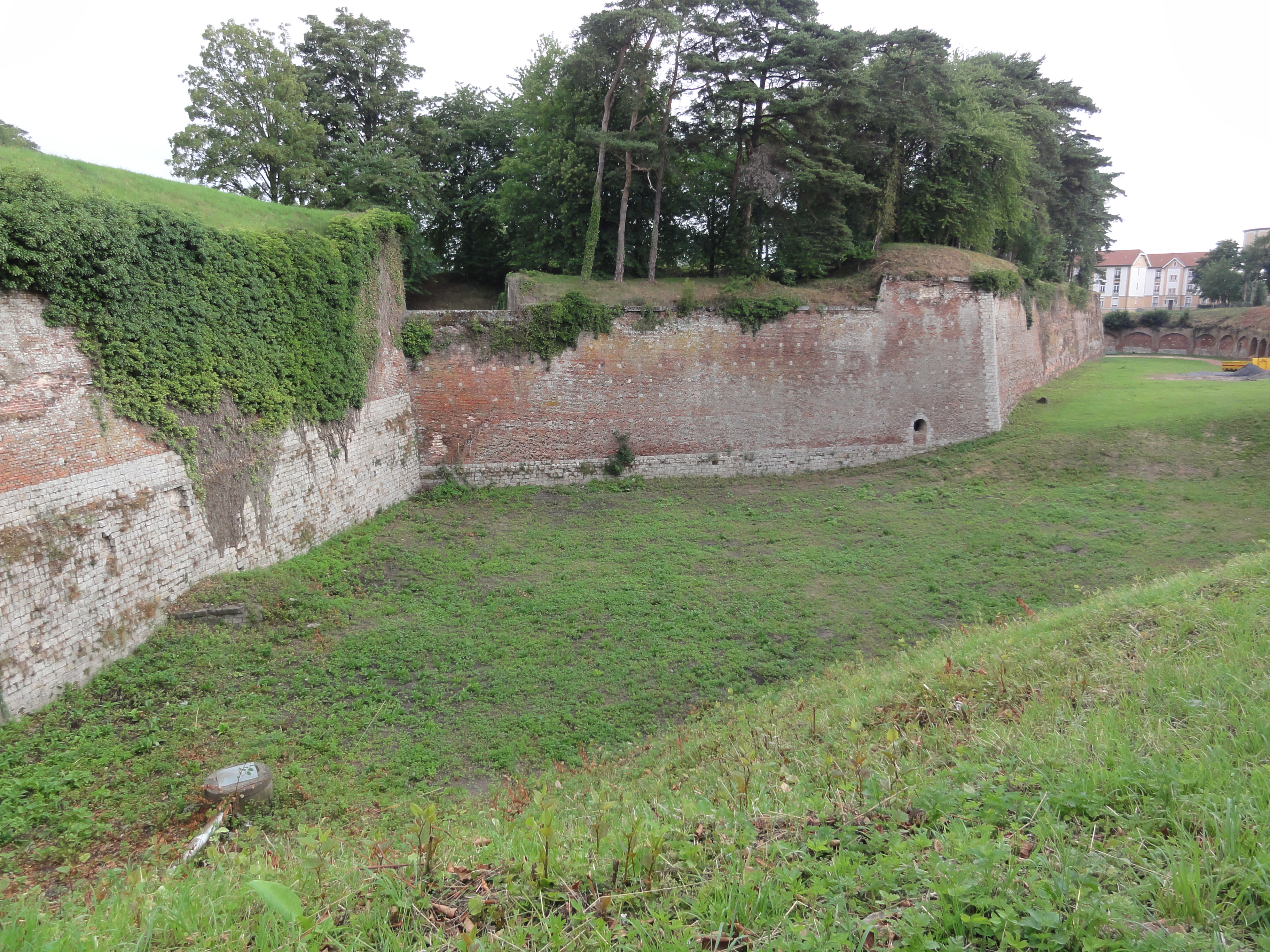 Le Quesnoy (Nord, Fr) remparts